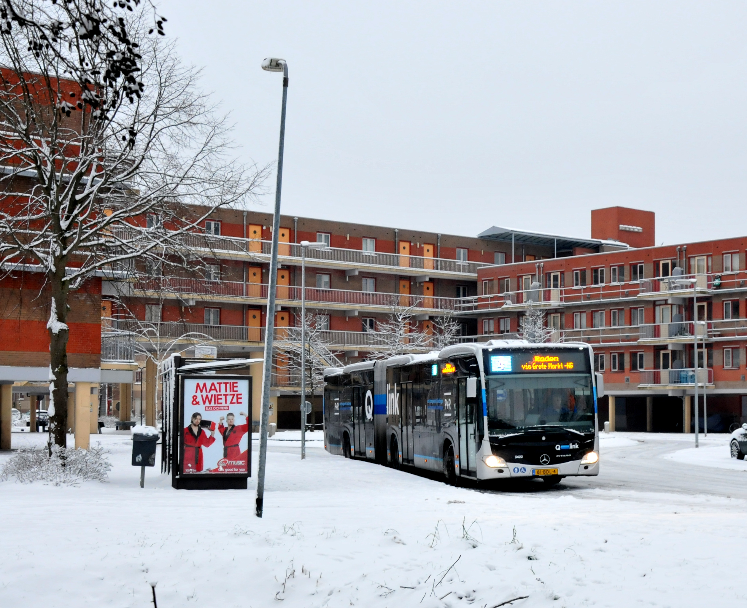 Qbuzz bus 3422 van het type Mercedes O530 Citaro G als Q-link 4 naar Roden te Beijum.